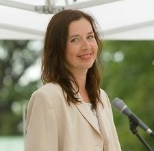 Piret Tatar Kadrioru kontserdil